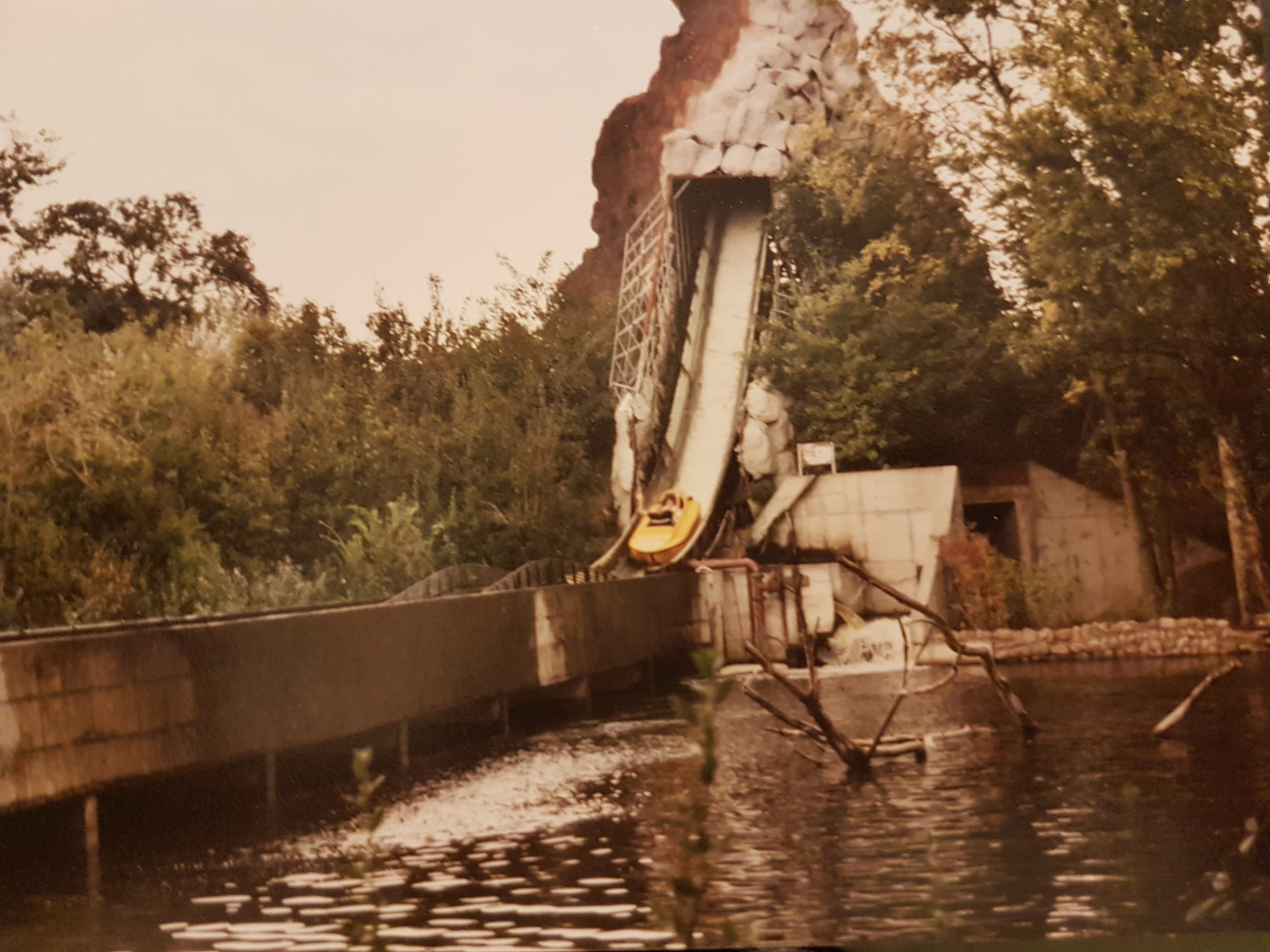 alte Fotoaufnahme von der Wildwasserbahn im Spreepark Berlin (etwa im Jahr 1999)